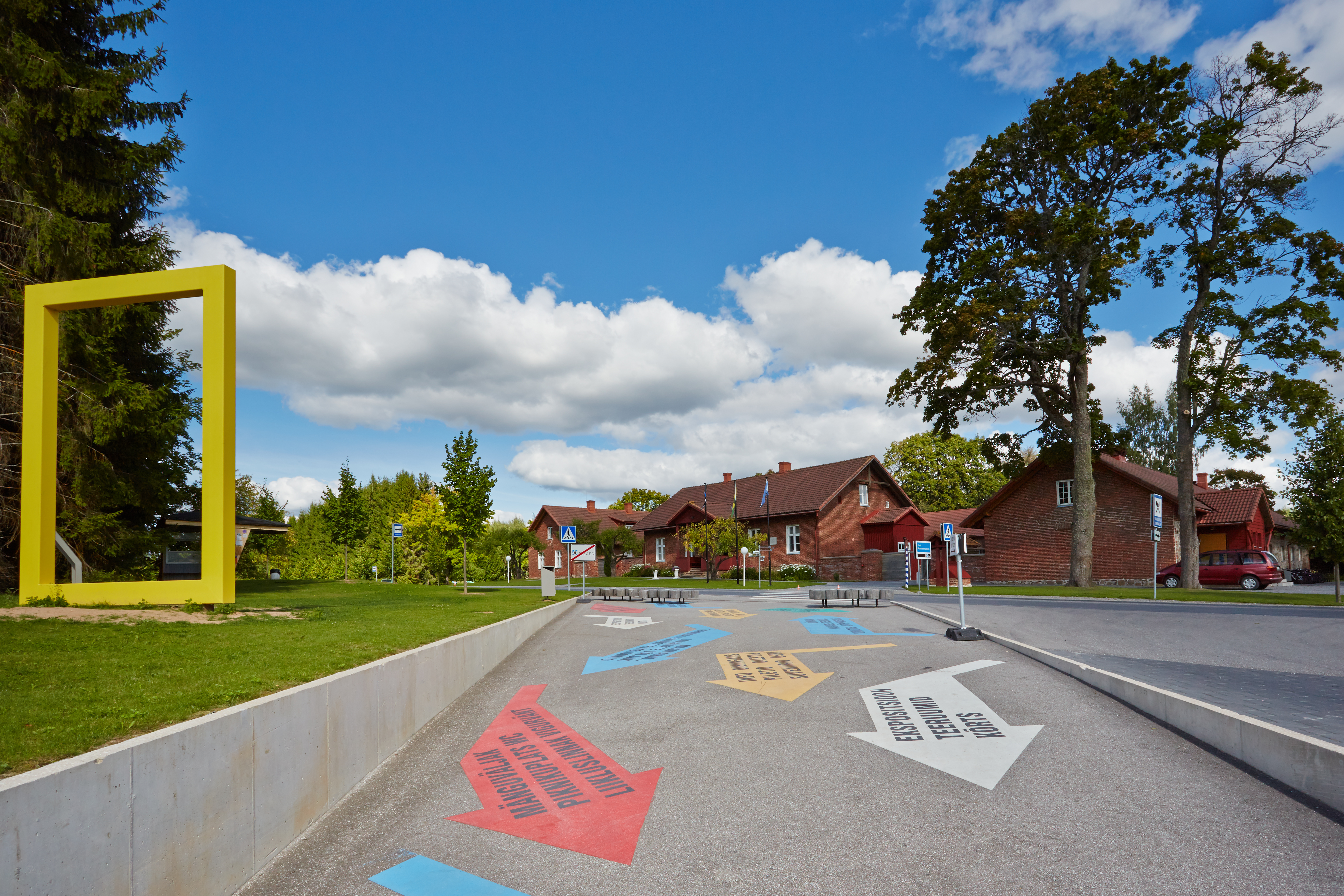 Varbuse postijaama hooned, kus praegu asub Eesti Maanteemuuseum. Tagaplaanil keskel on Varbuse postijaama peahoone.